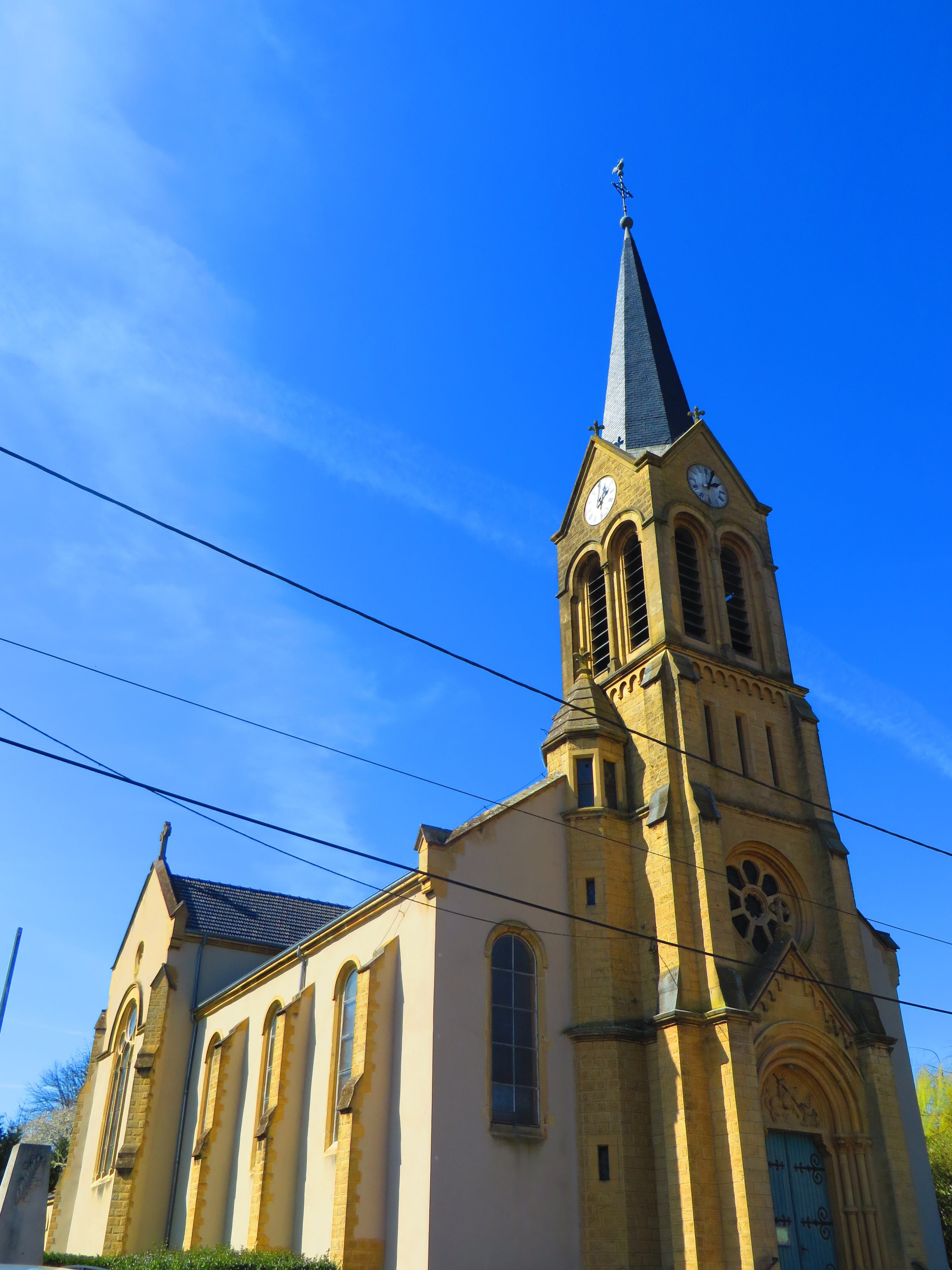 Lesse Église Saint-Georges